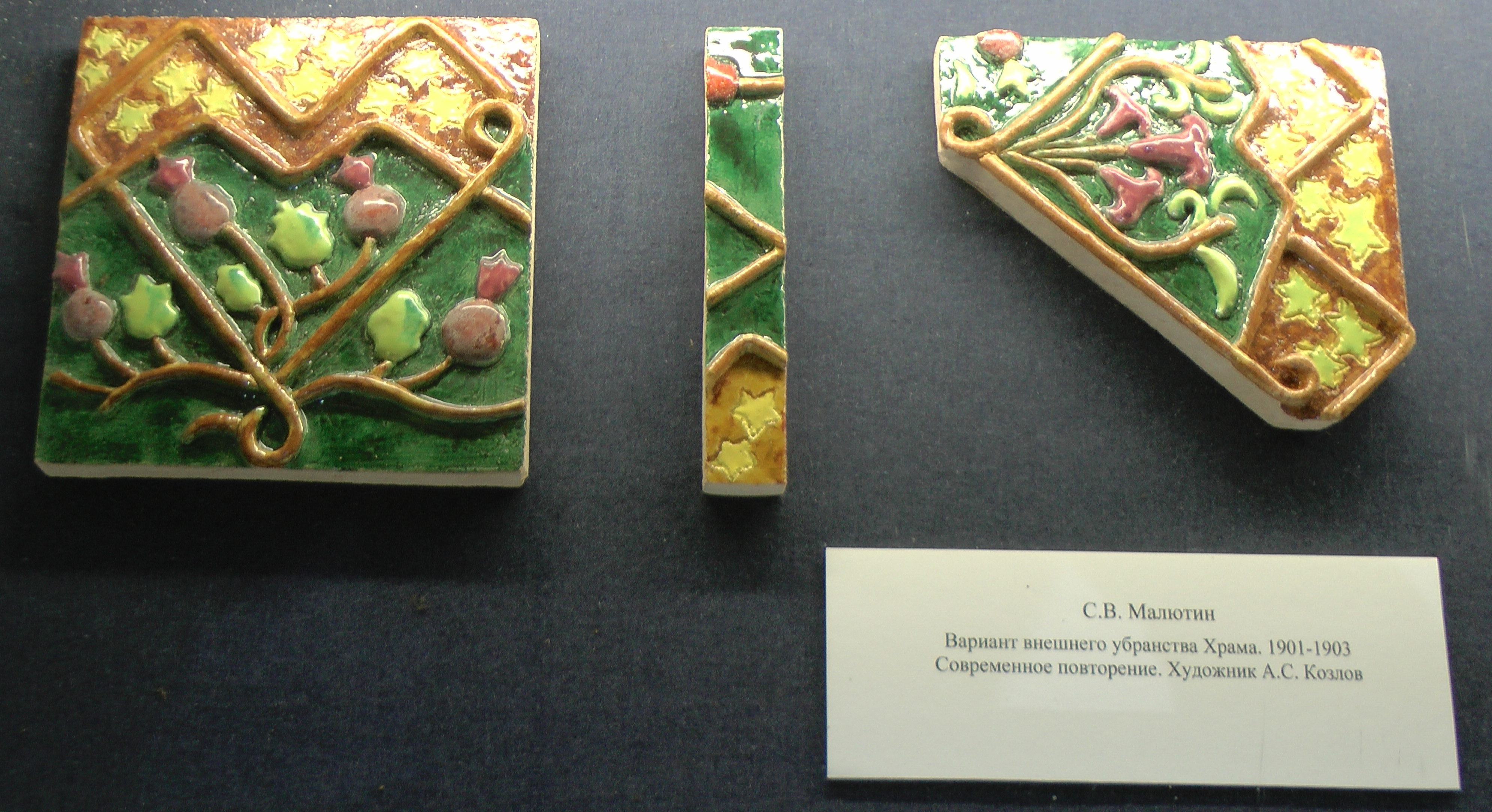 С. В. Малютин. Элементы декора храма. Современная реконструкция на основе эскизов художника. Музей в Талашкино. Экспозиция.